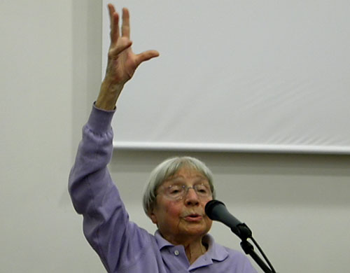 Silvia Montefoschi em conferência